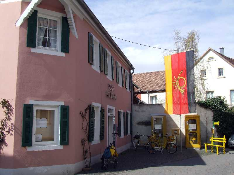 Postmuseum Rheinhessen, Postmuseum Rheinhessen in Erbes-Büdesheim.